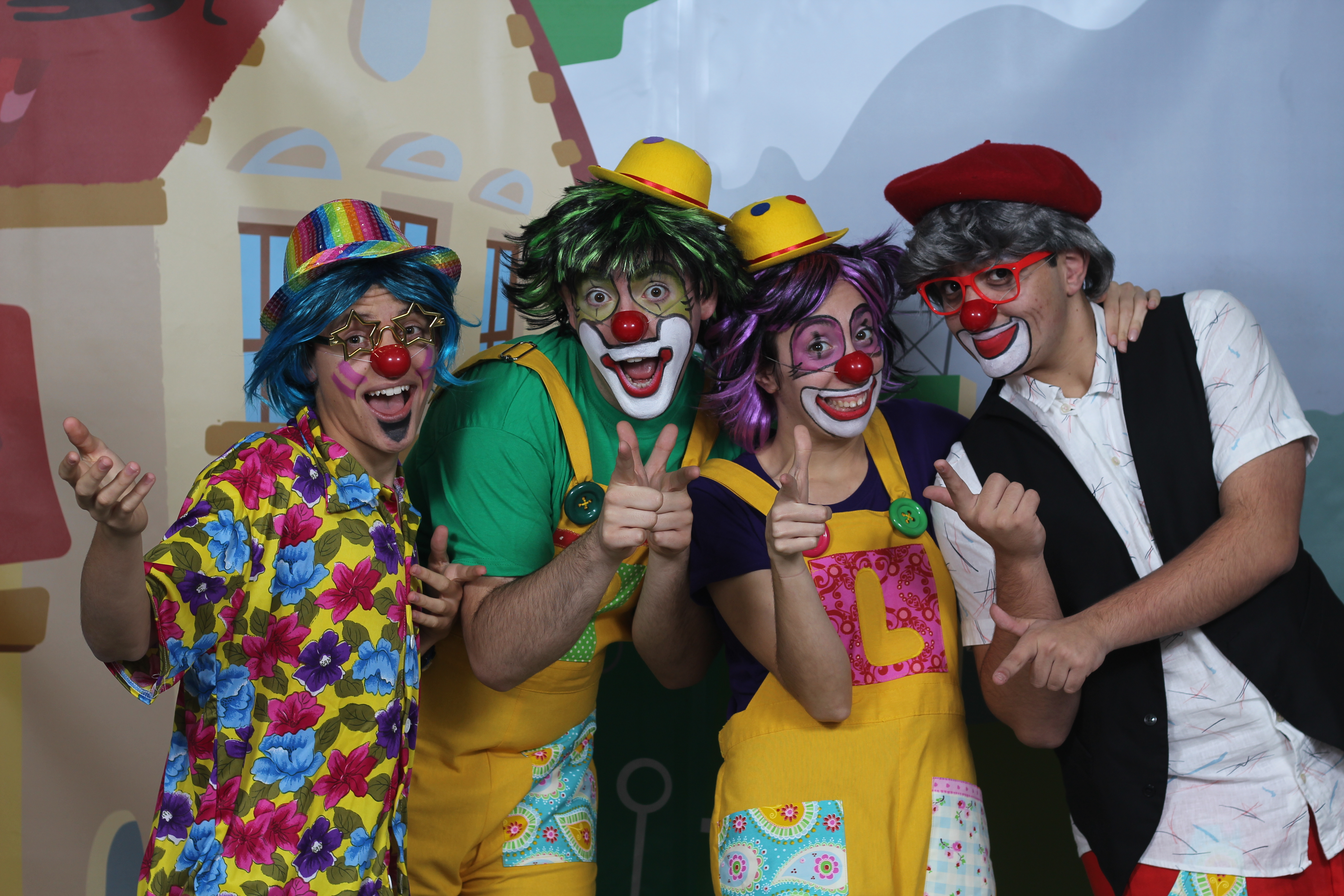 Potx eta Lotx